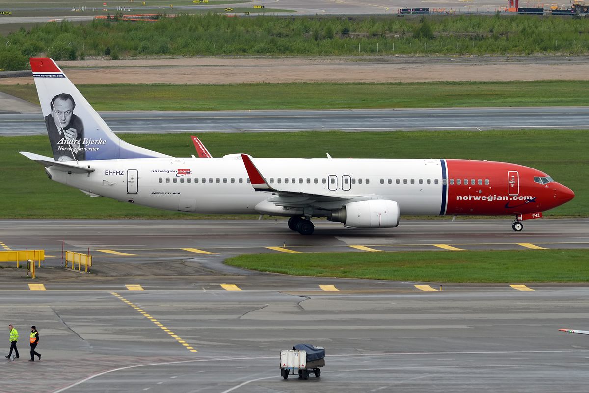 Norwegian, EI-FHZ, Boeing 737-8JP